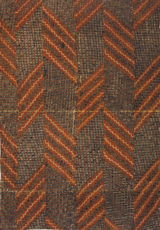 Hawaiian kapa